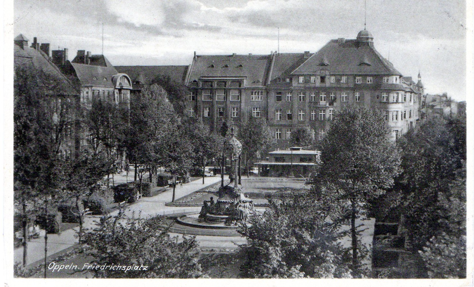 der ehemalige Friederichsplatz in Oppeln 1941